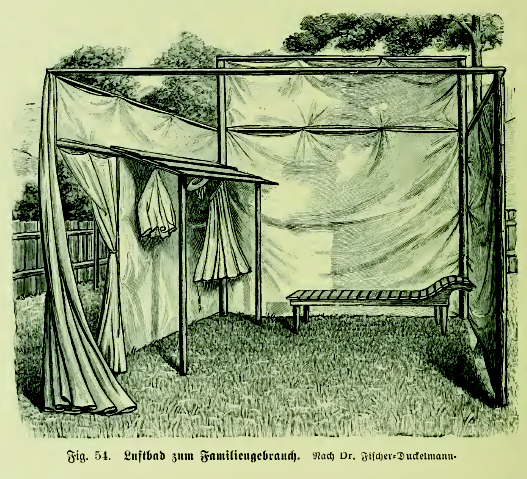 Fig. 54. Luftbad zum Familiengebrauch. Nach Dr. Fischer-Dückelmann.